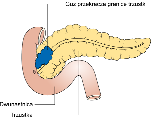 Cecha T3 w TNM raka trzustki